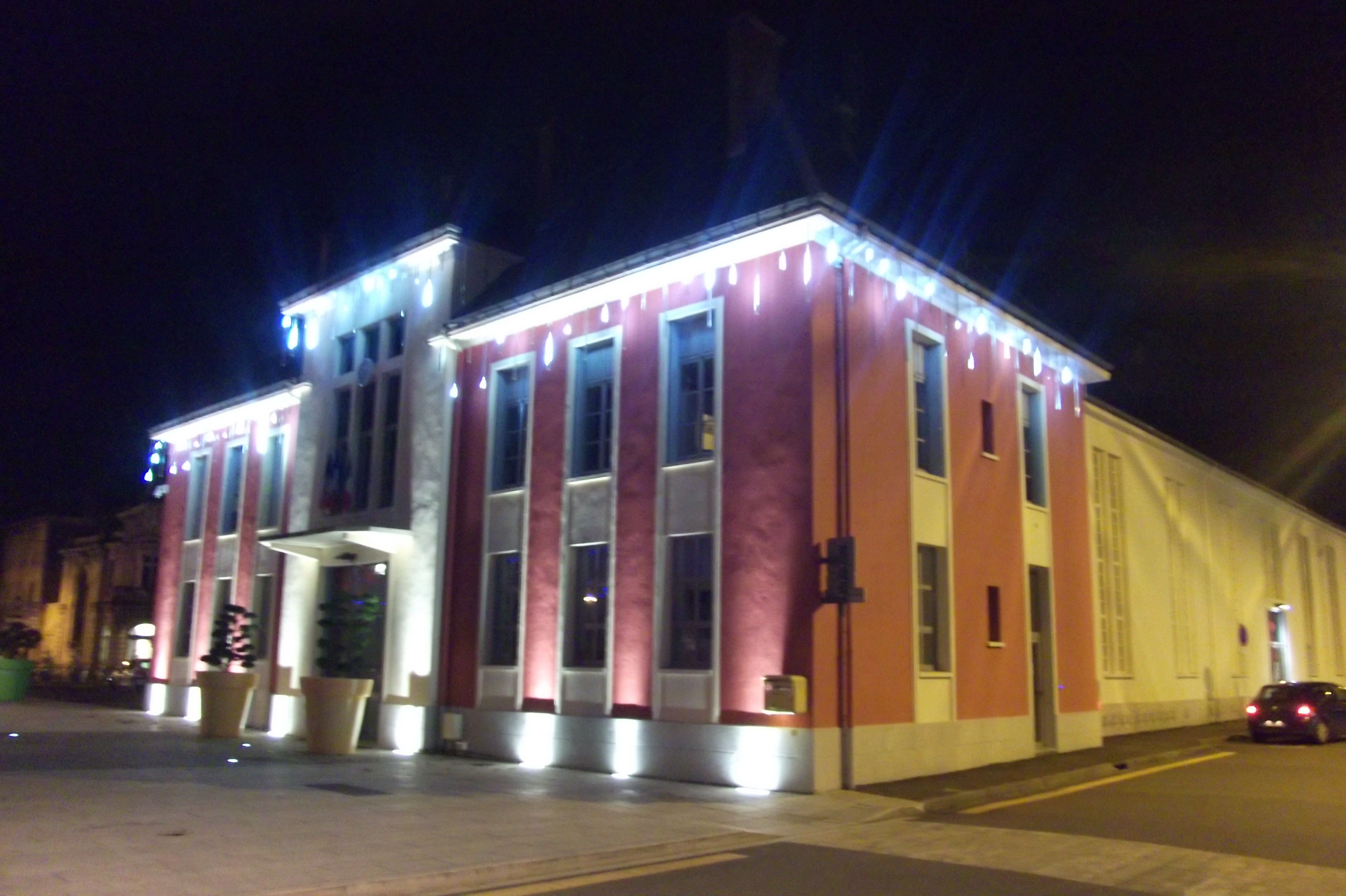 Les halles de Vesoul (Haute-Saône, Franche-Comté)